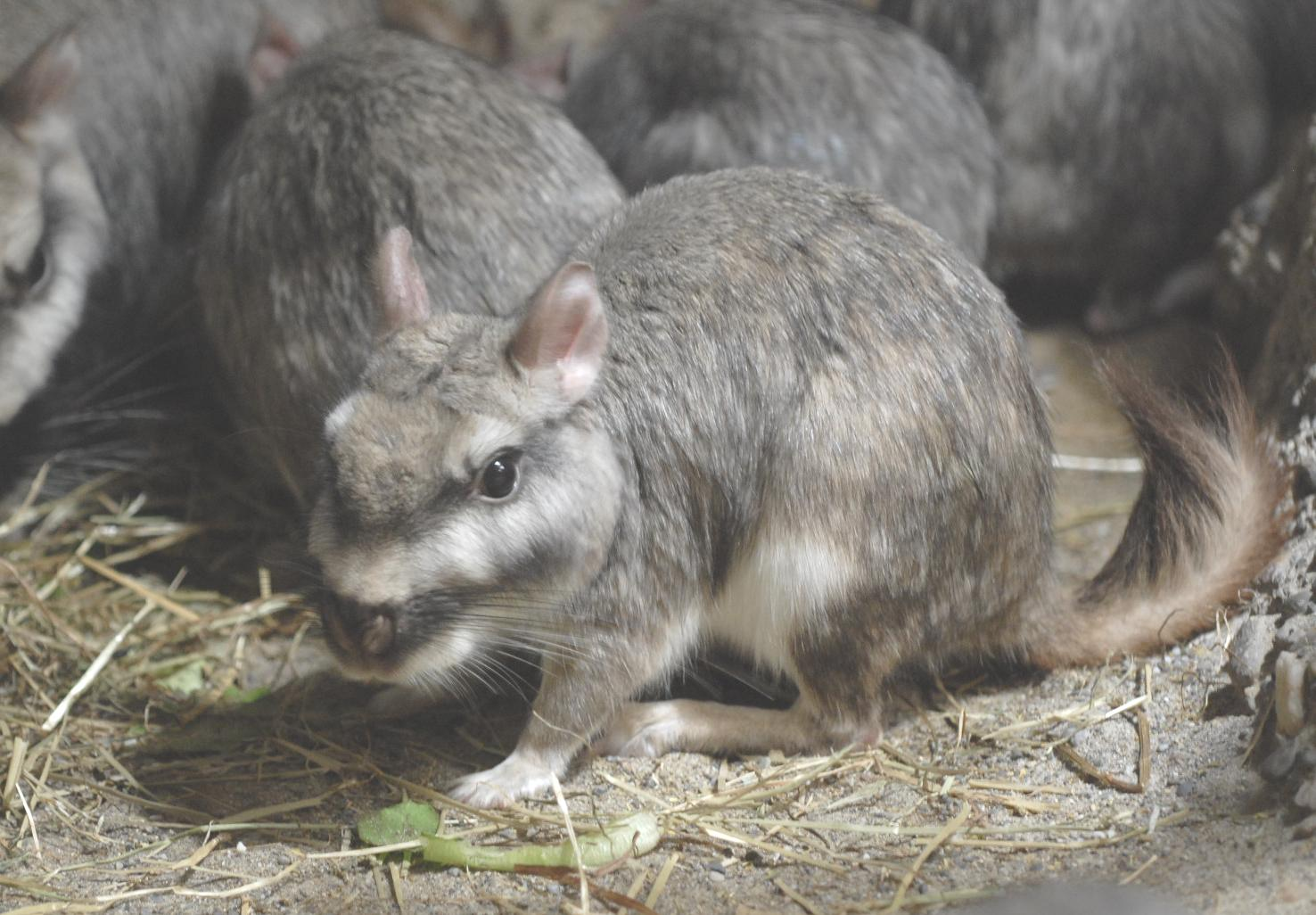 Viscacha, aufgenommen im Züricher Zoo, Schweiz